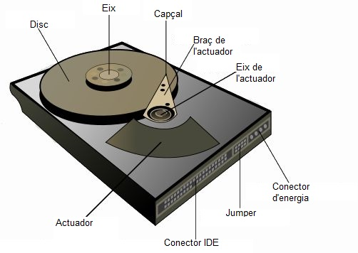 Aquestes són les parts principals dels disc dur.